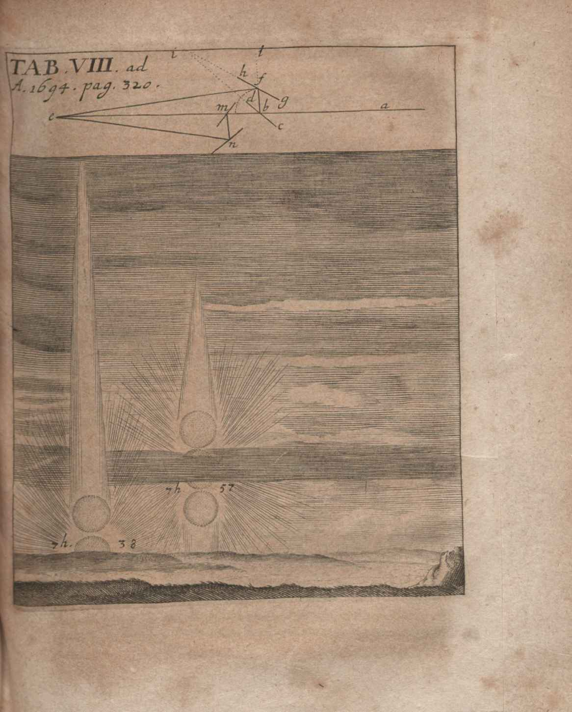 Illustration